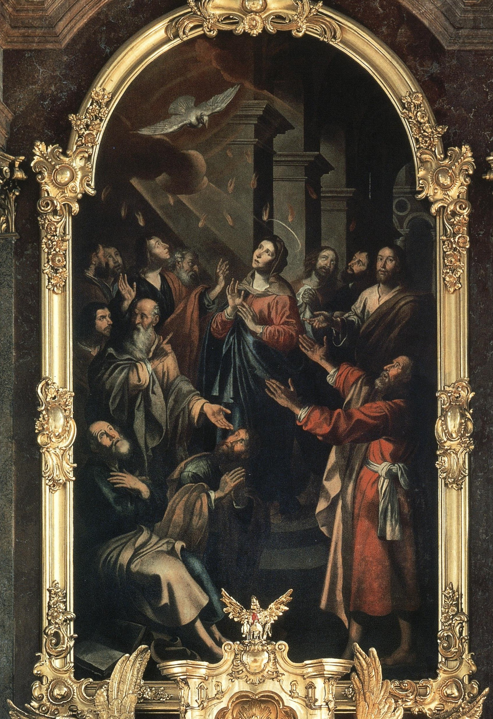 Altarbild